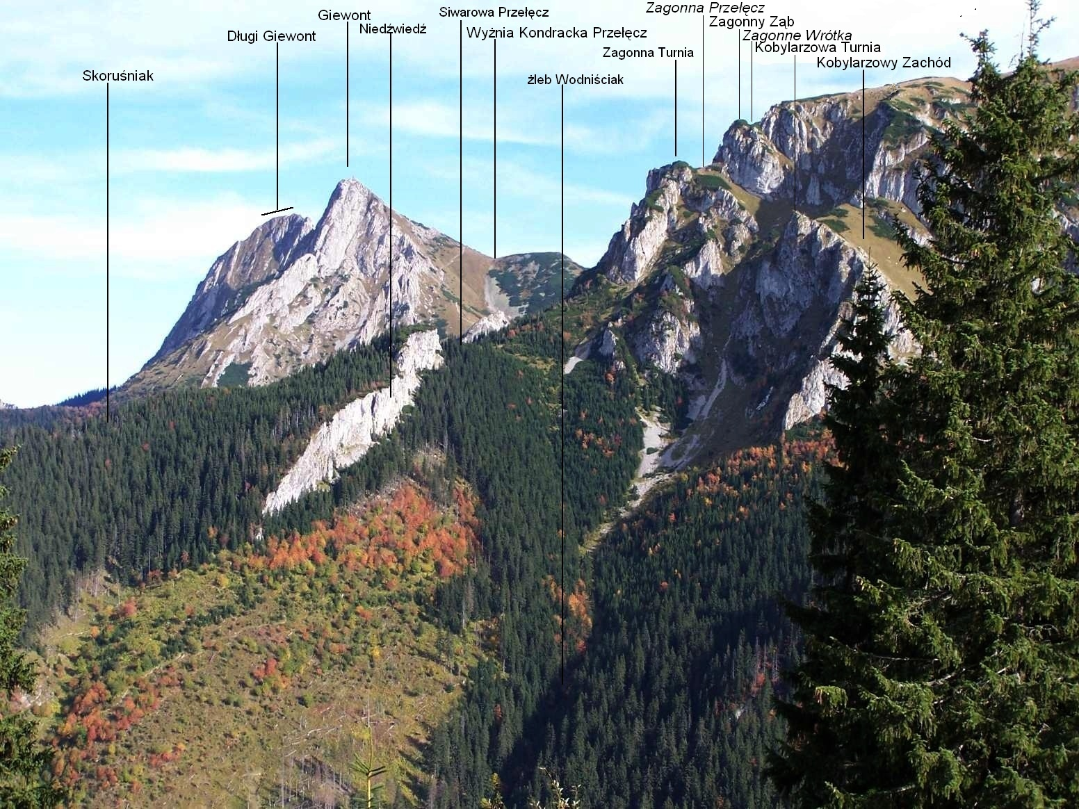 Widok z grzbietu Ciemniaka